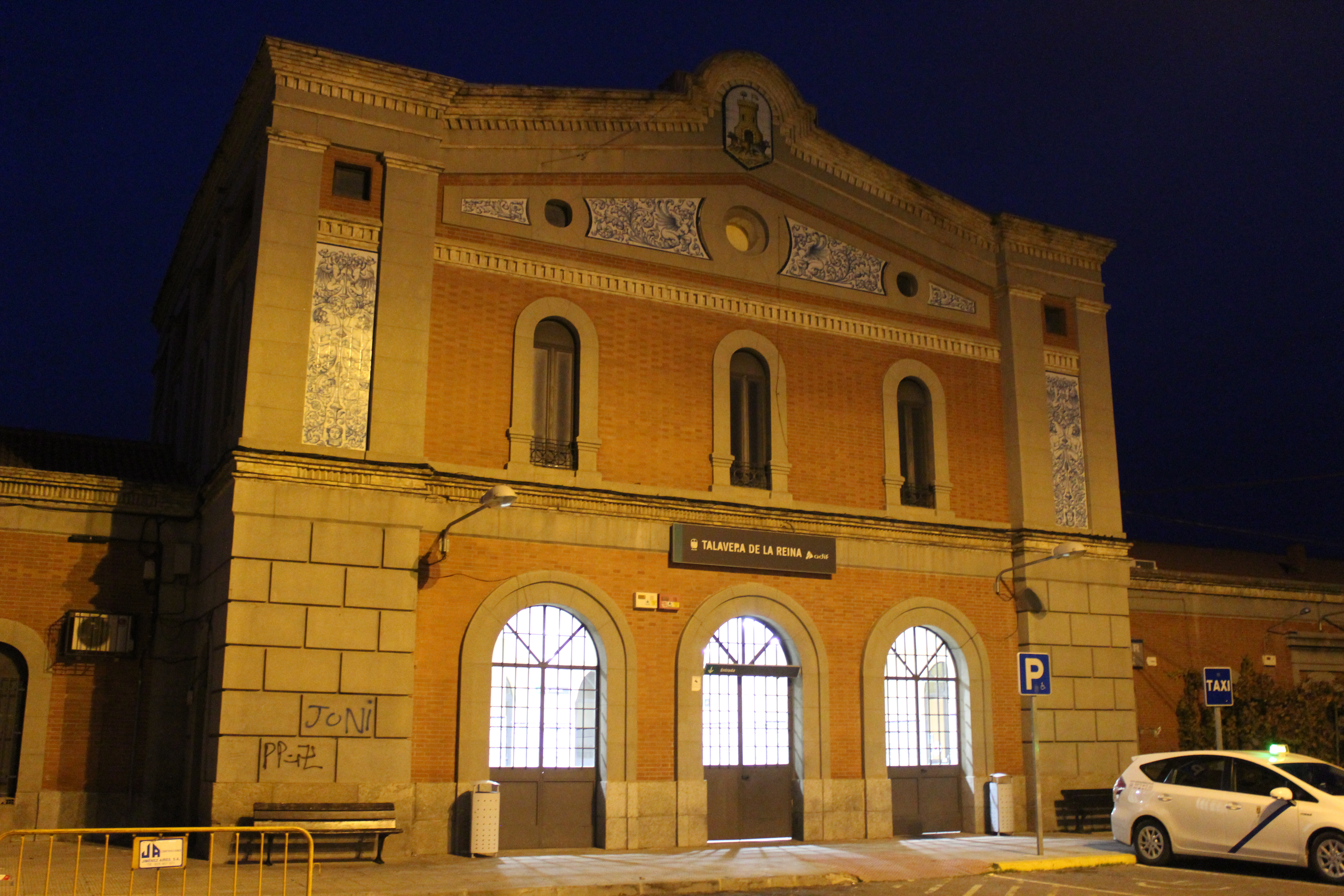 Estación de Talavera de la Reina.